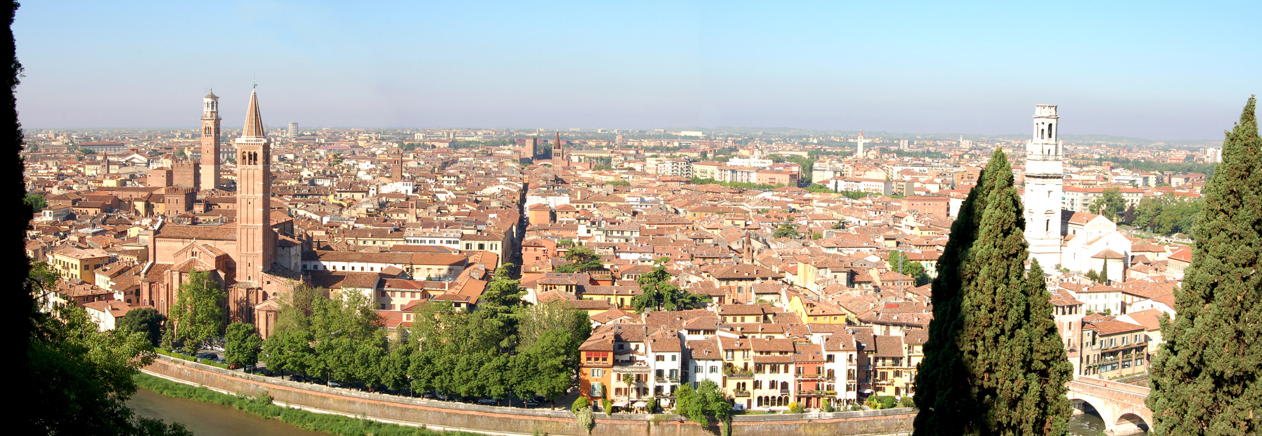 Fotografia del centro cittadino di Verona dall'alto, in particolare svettano la chiesa di Sant'Anastasia, il Duomo e la torre civica (o dei Lamberti)